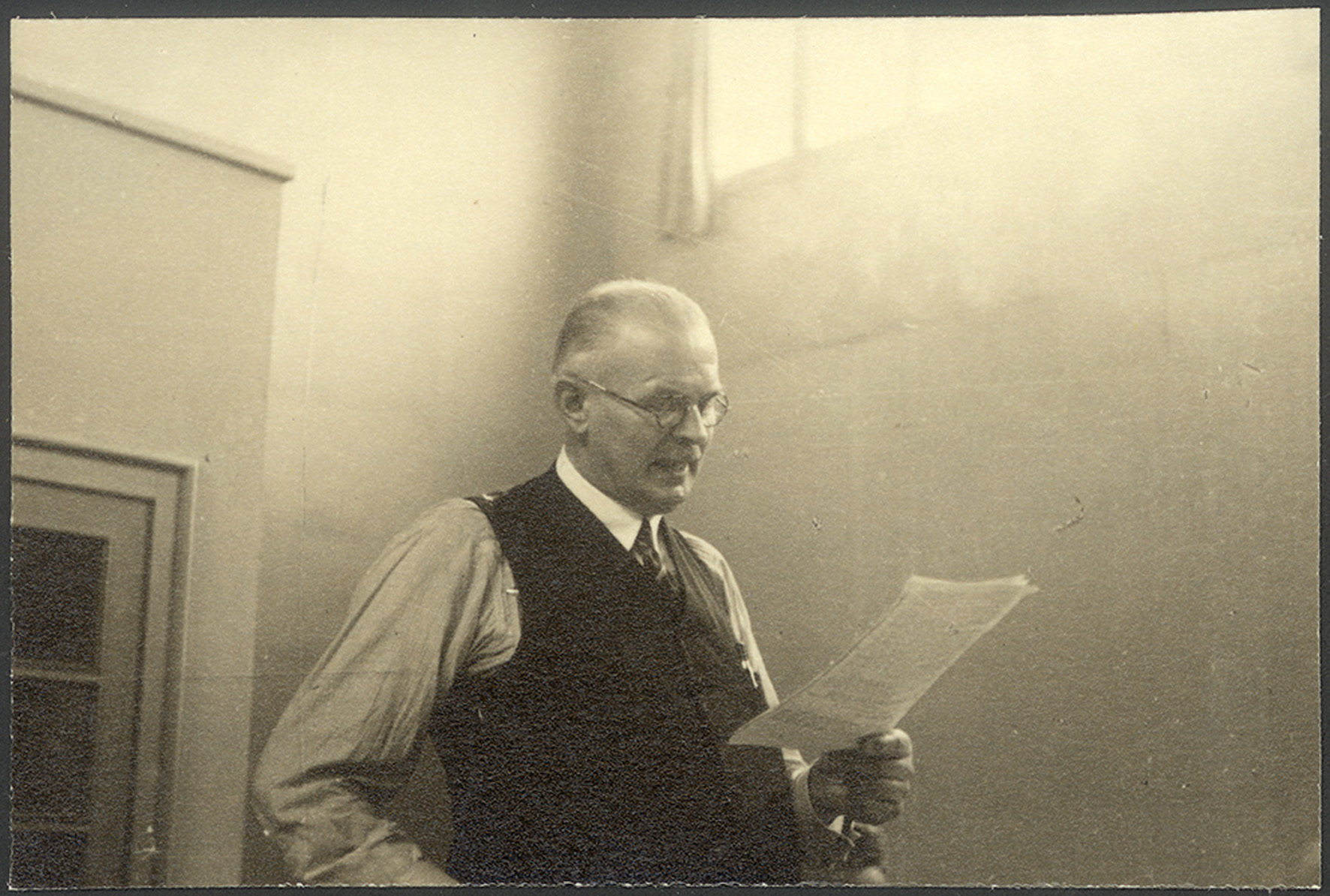 Humburg, Paul Pfarrer Gemarke, Freie Evangelische Synode Barmen 3. und 4. Januar 1934, Abgabe: Heinz Joachim Held 05/2006 Bestand: AEKR Düsseldorf 8SL 046 (Bildarchiv), 80018_05